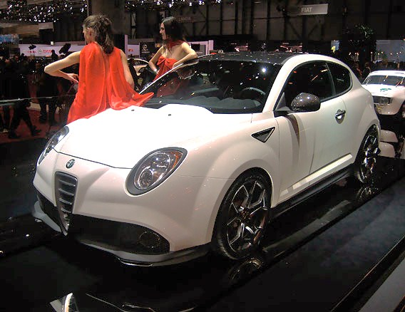 Il concept di MiTo GTA esposto a Ginevra 2009 con motore 1.750 TBi benzina iniezione diretta